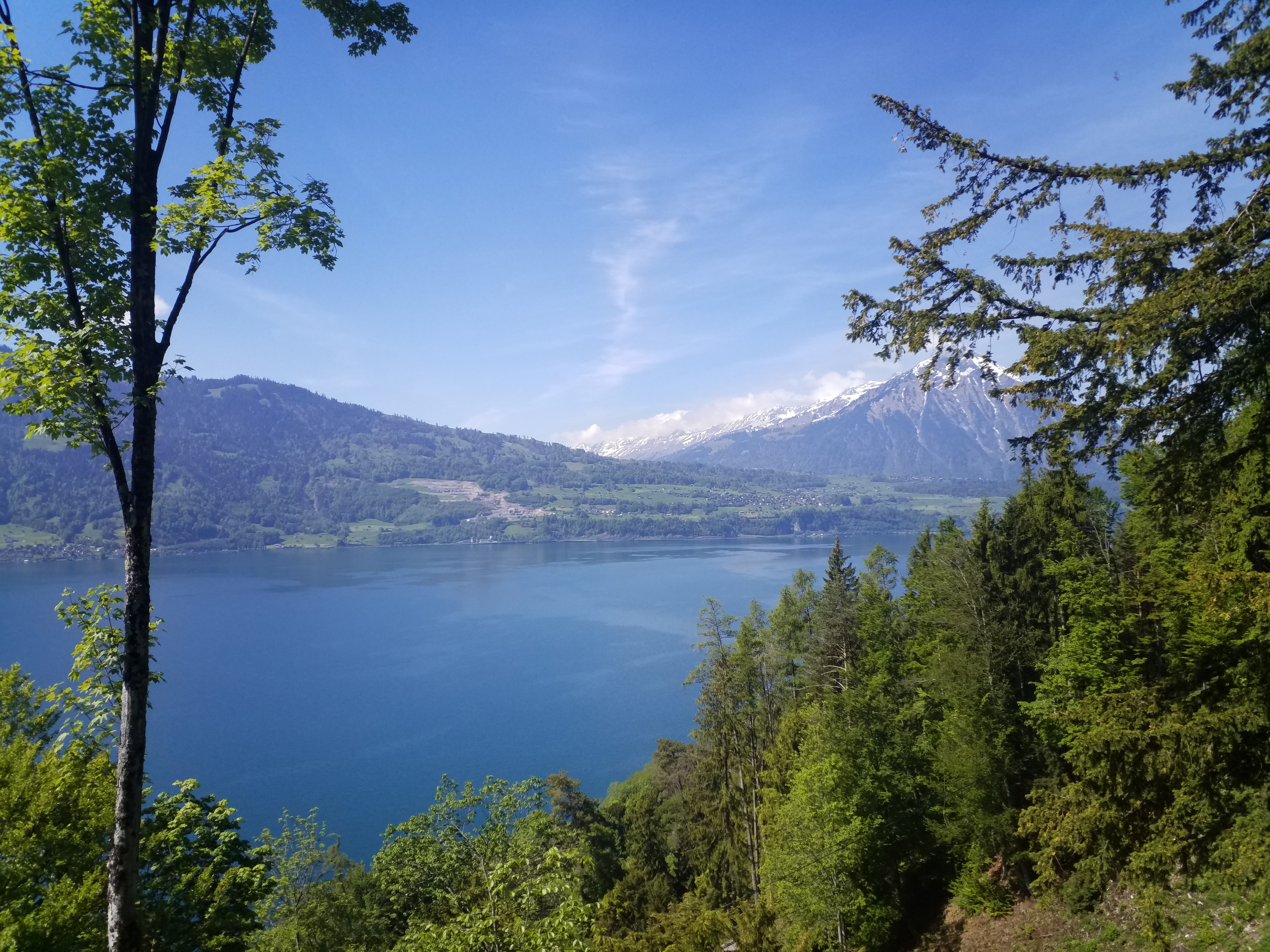 St. Beatus-Höhlen, Thunersee